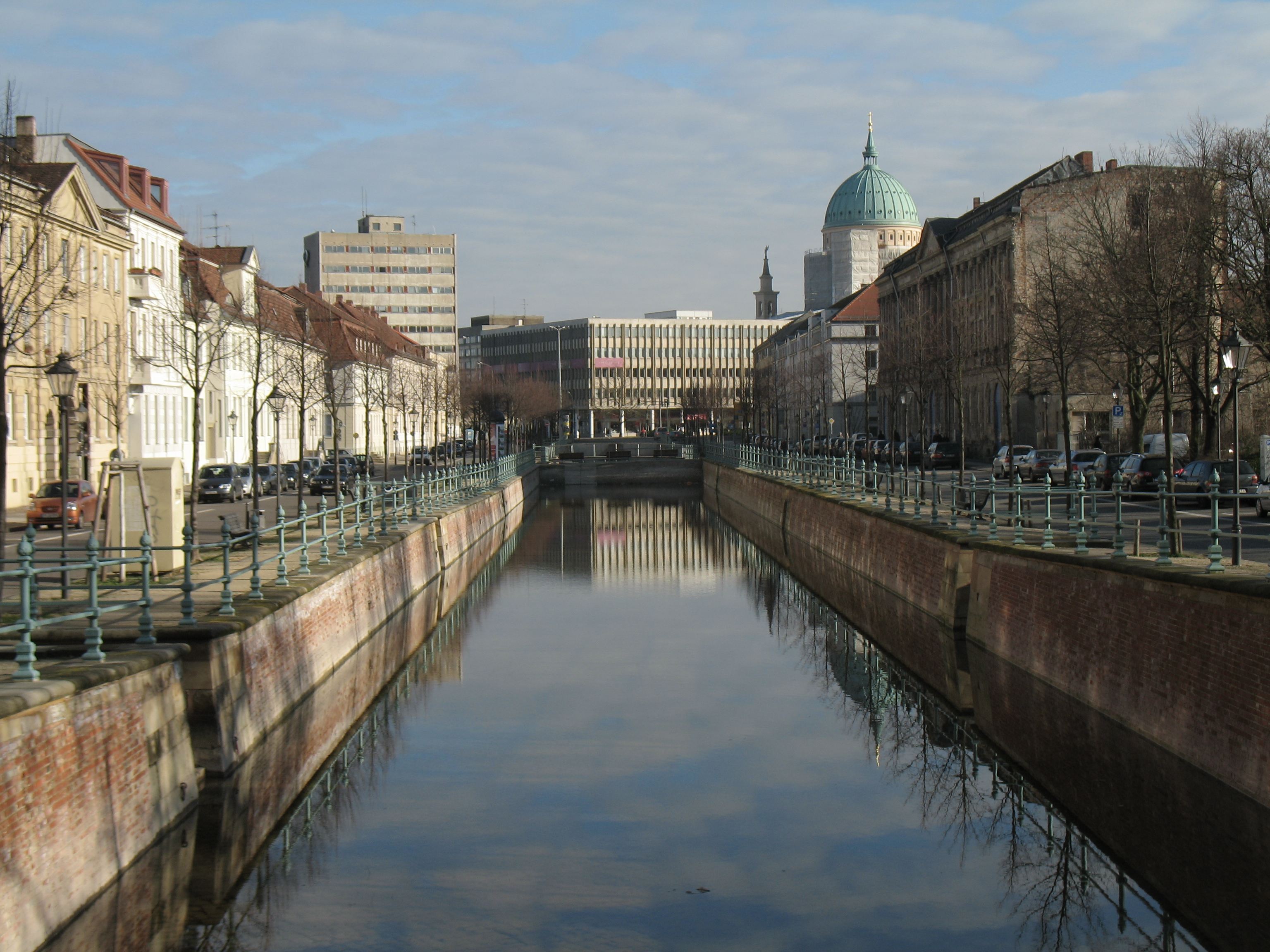 Ein Teilstück des rekonstruierten Stadtkanals in Potsdam, gesehen vom ehemaligen Standort der Waisenbrücke. Im Hintergrund sind die Stadt- und Landesbibliothek sowie die St. Nikolaikirche mit ihrer grünen Kuppel zu erkennen.